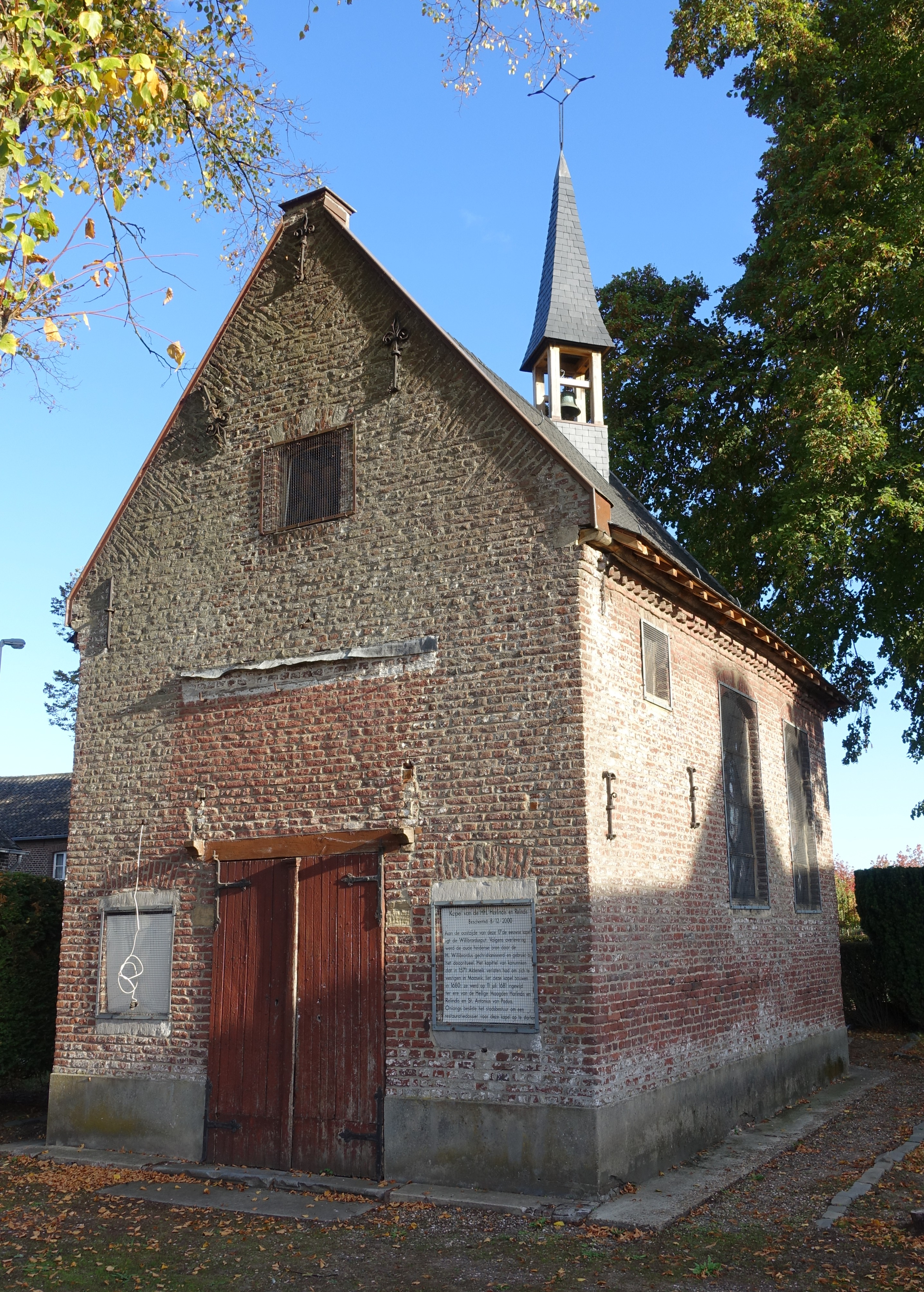 Chapel in Aldeneik (Belgium)